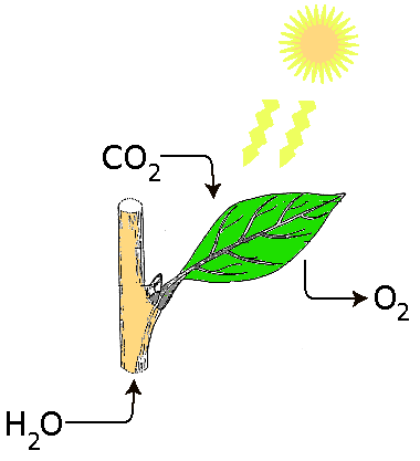 Fotosynteza